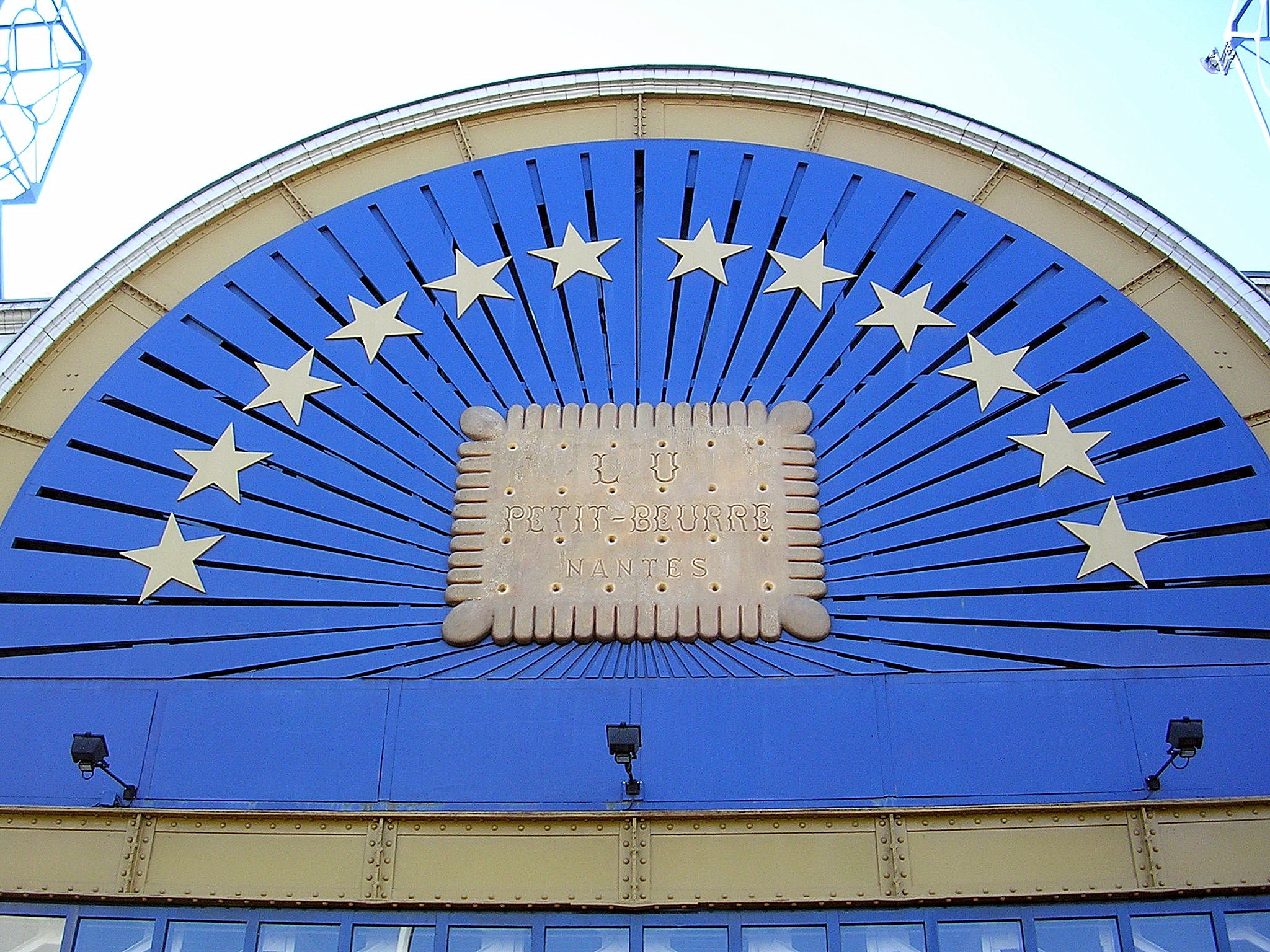 LU à Nantes. Photo prise par Jibi44